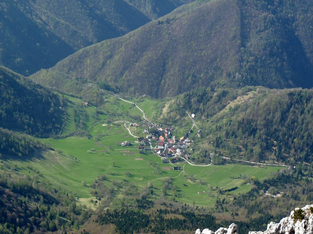 Rut